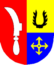 znak obce Kobeřice u Brna